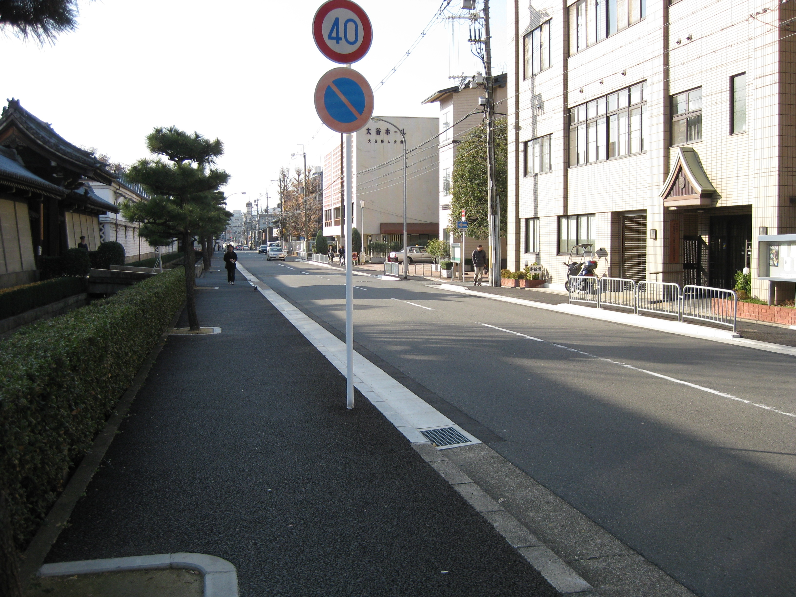 花屋町通 京都市下京区 烏丸通との交差点付近から西方向